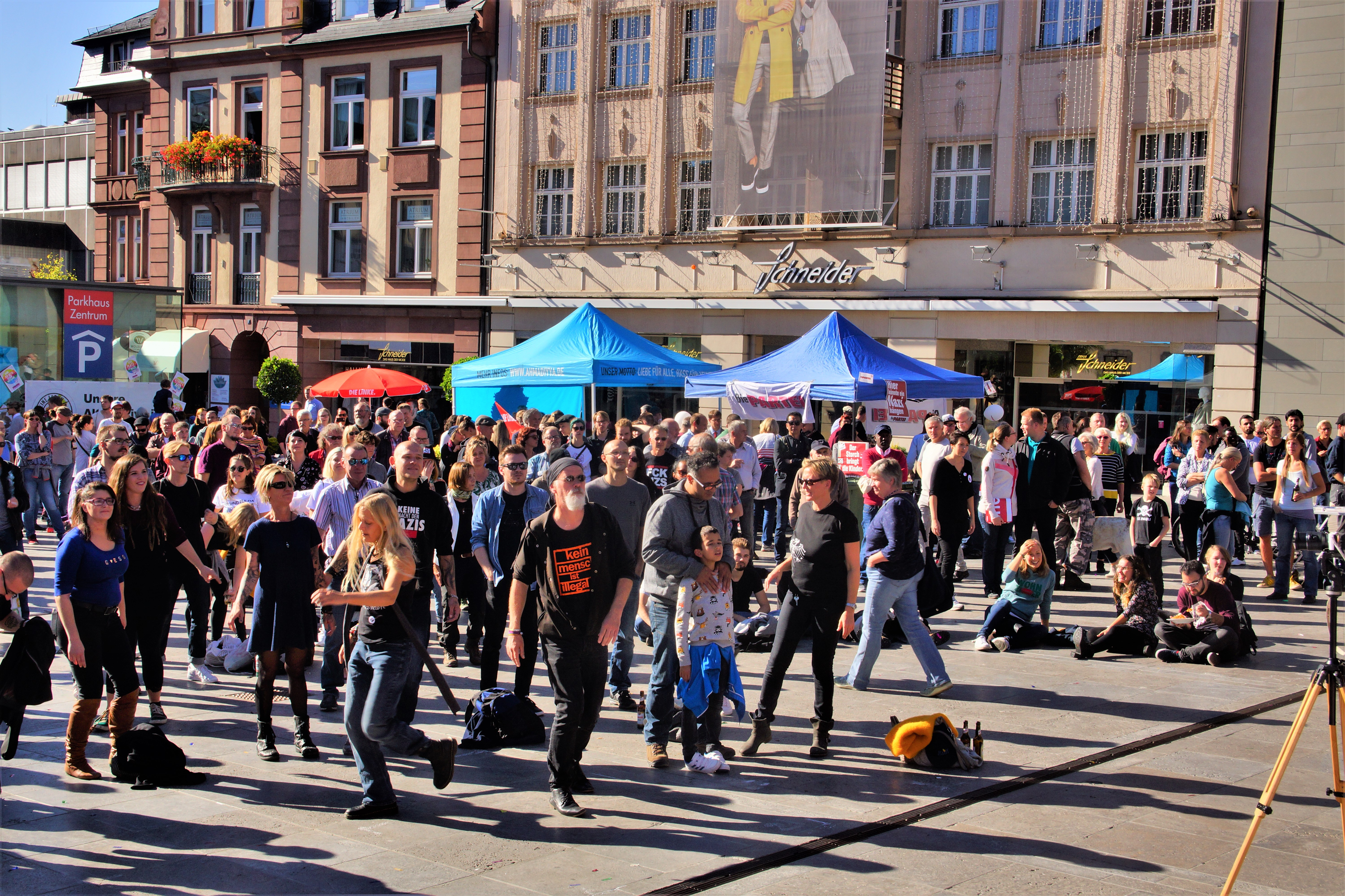 Tanzendes Publikum